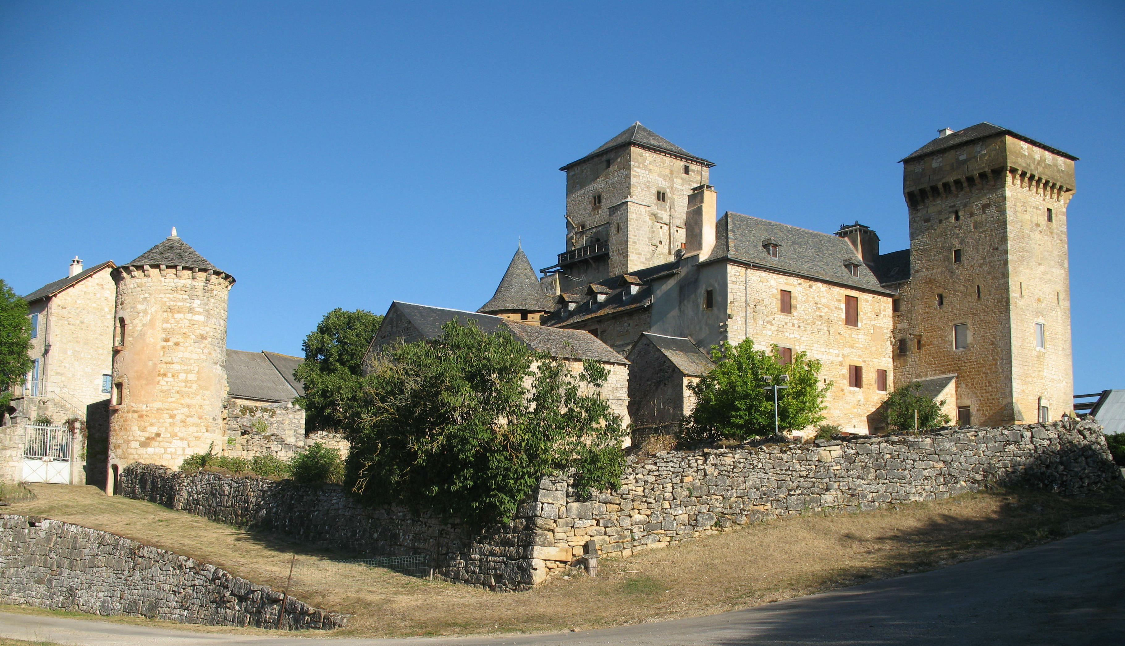 Château de Galinières, à Pierrefiche, dans l'Aveyron.